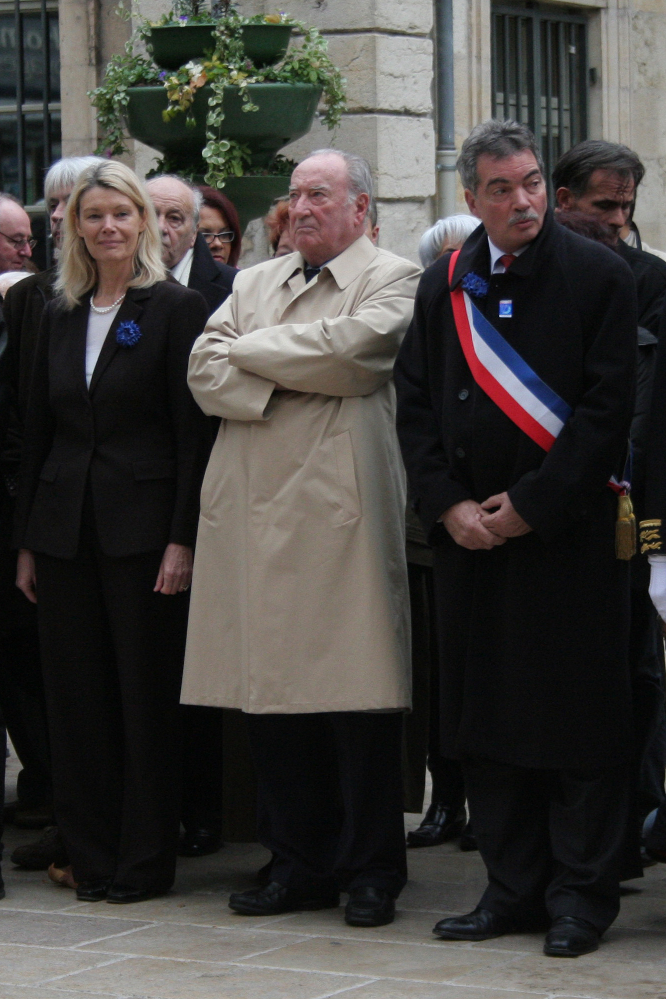 Maurice Faure aux cotés de Dominique Orliac et Marc Lecuru, le 11 novembre 2007 à Cahors.